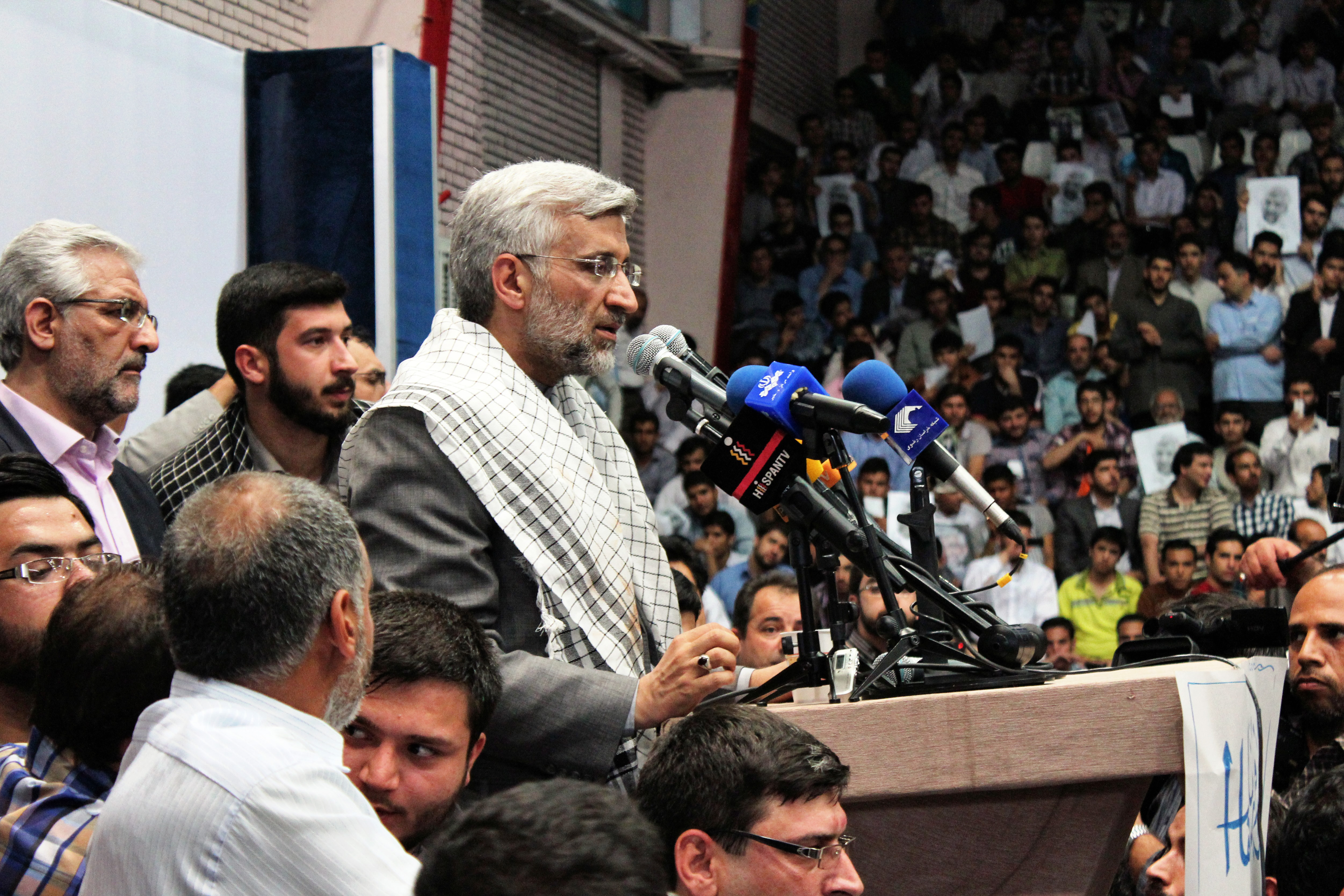 دکتر سعید جلیلی در سفر انتخاباتی مشهد تاریخ ۲۰ خرداد ۱۳۹۲